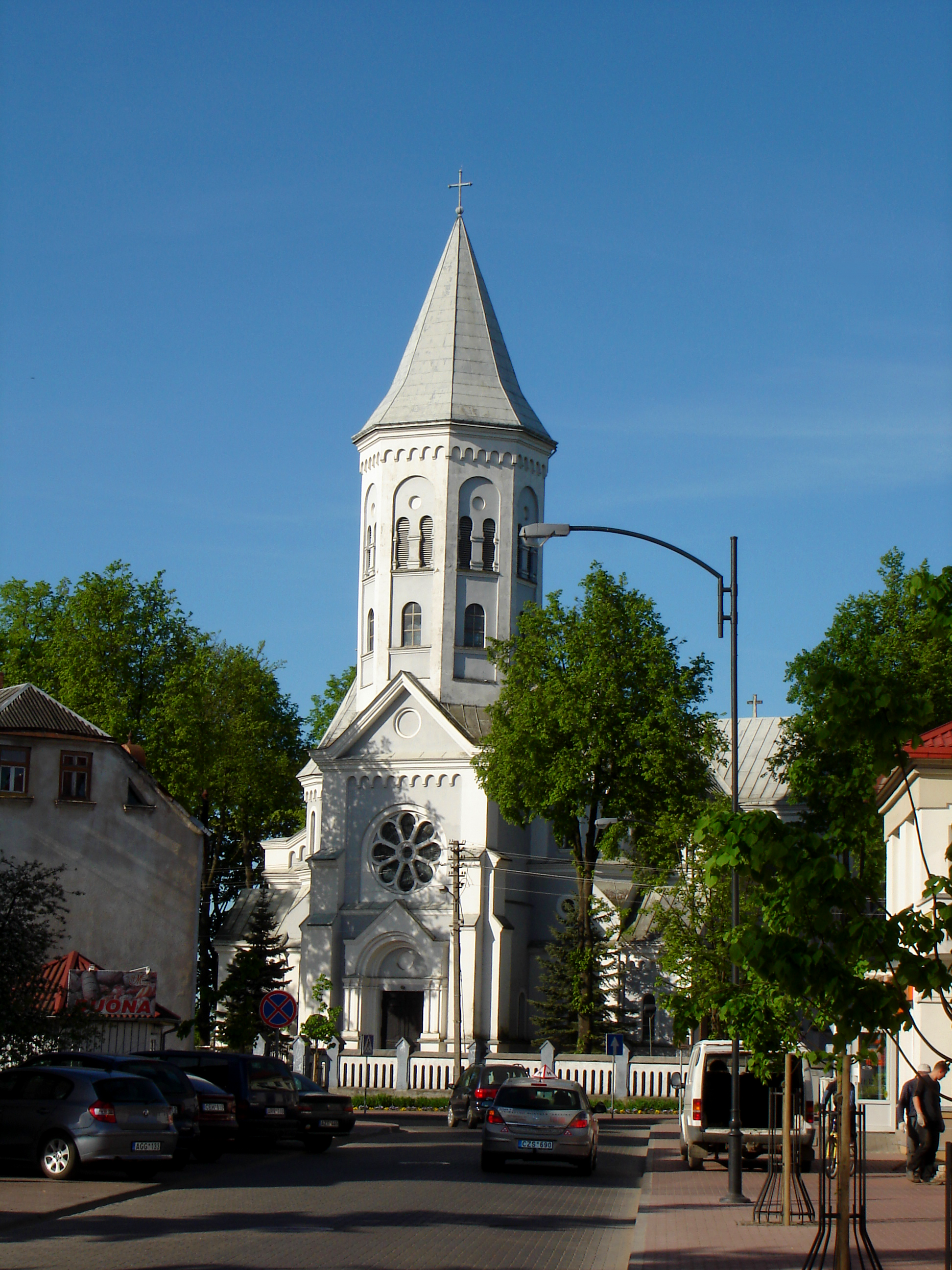 Litauen: Kirche in Tauragė